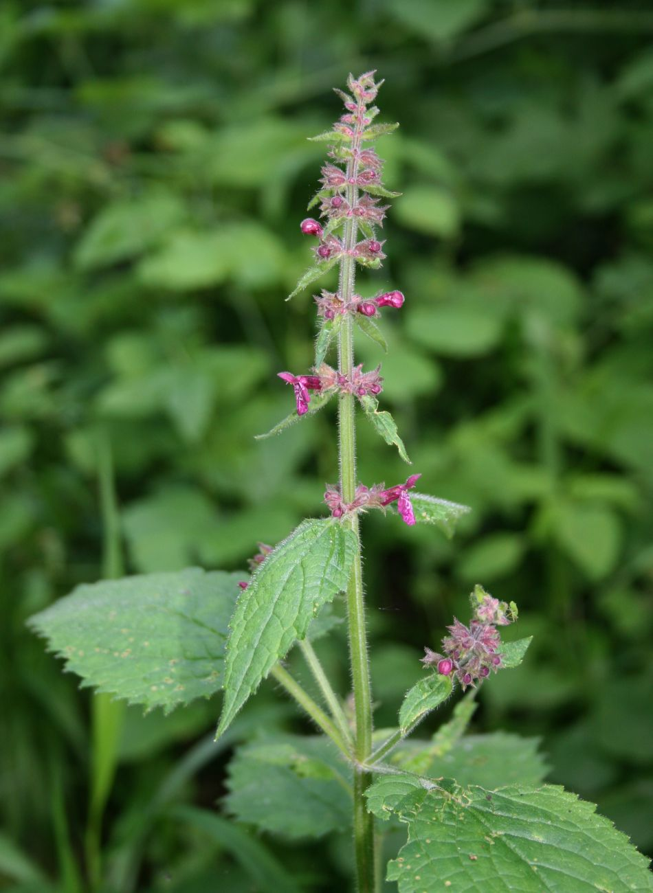 Wald-Ziest (Stachys sylvatica), Lippenblütler (Lamiaceae) - Österreich/Austria/Autriche: Oberösterreich, Hausruckviertel, Niederholzham N Schwanenstadt